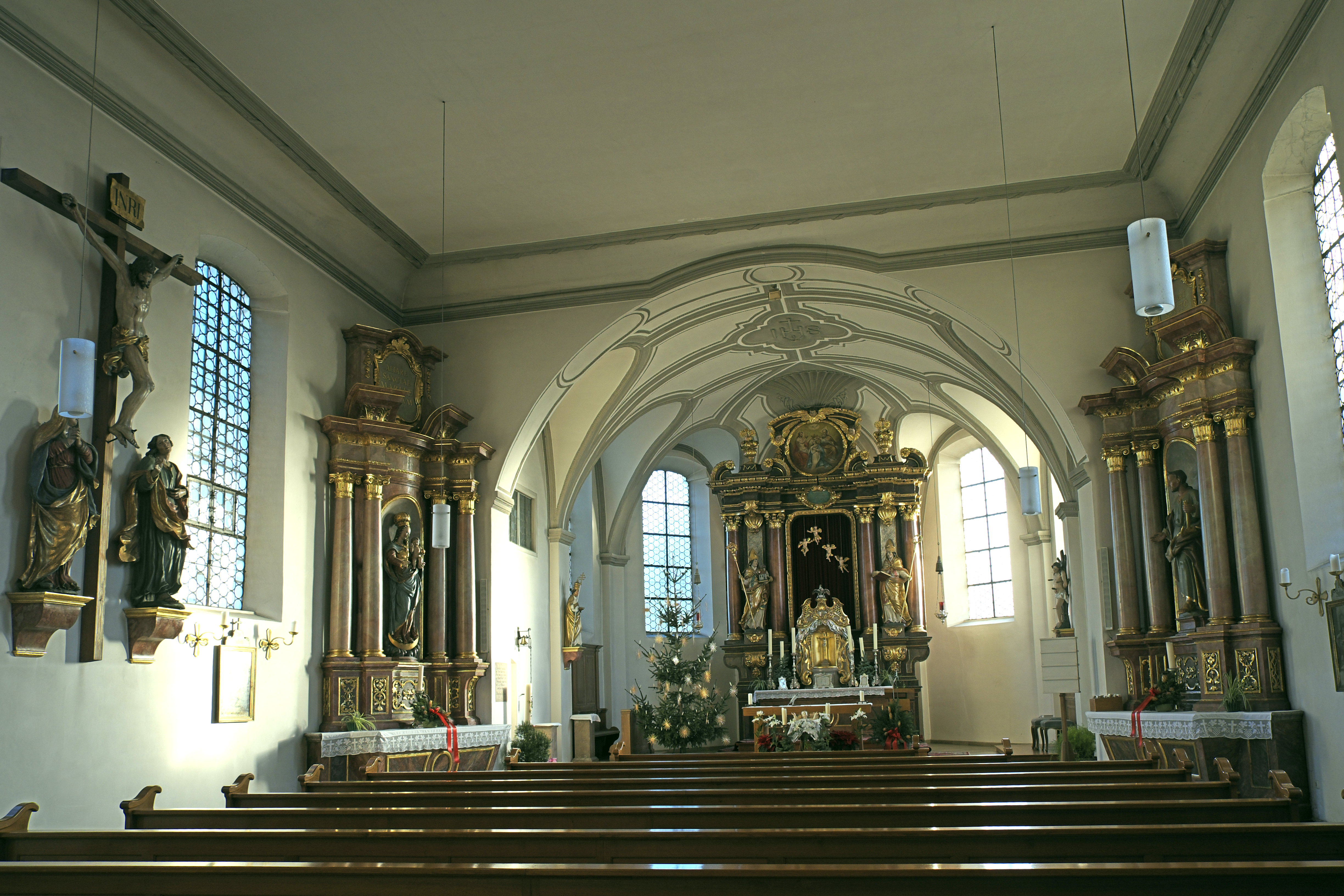 St. Peter und Paul in Allach im Stadtbezirk Allach-Untermenzing in München (Bayern/Deutschland), Innenraum